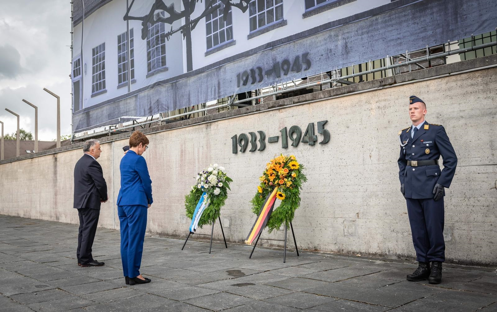 היום (שלישי), התקיים כחלק מתרגיל חיל האוויר בגרמניה, מטס "זיכרון לעתיד" - מטס הצדעה משותף בהובלת מפקד חיל האוויר, אלוף עמיקם נורקין, בליווי מפקדת טייסת הטיסה הראשונה בחיל-האוויר הישראלי, מפקדת טייסת "הנחשון", סגן-אלוף ג', ולצד מפקד חיל האוויר הגרמני, לוטננט גנרל אינגו גרהארץ. בהמשך היום נערך טקס קרקעי במחנה הריכוז "דכאו" בהשתתפות שרת ההגנה הגרמנית, גברת אנגרט קראמפ-קארנבאואר, שגריר ישראל בגרמניה, מר ג'רמי יששכרוף, מפקדי חילות-האוויר ונציגים נוספים.